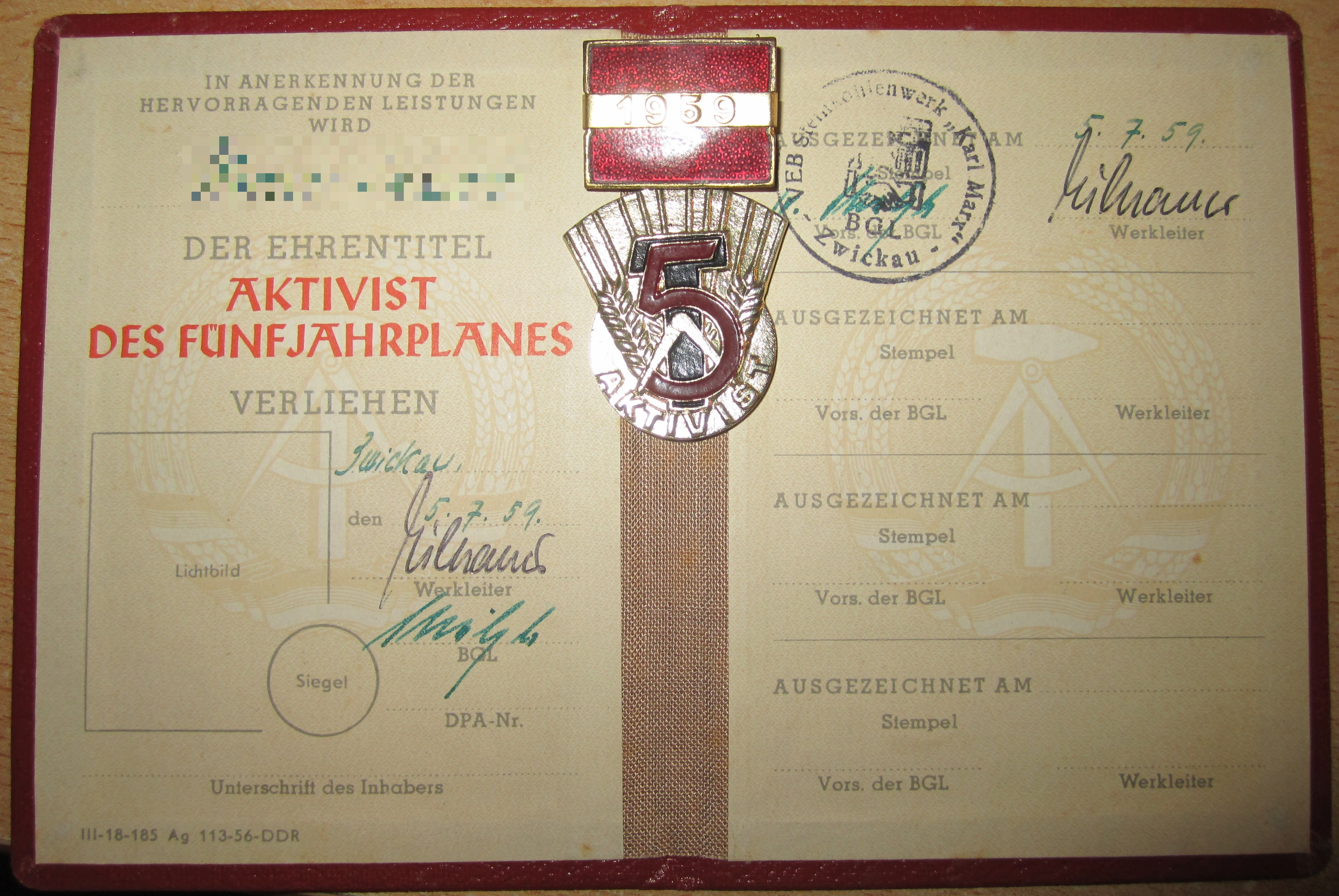 Aktivistenausweis Fünfjahrplan 1959